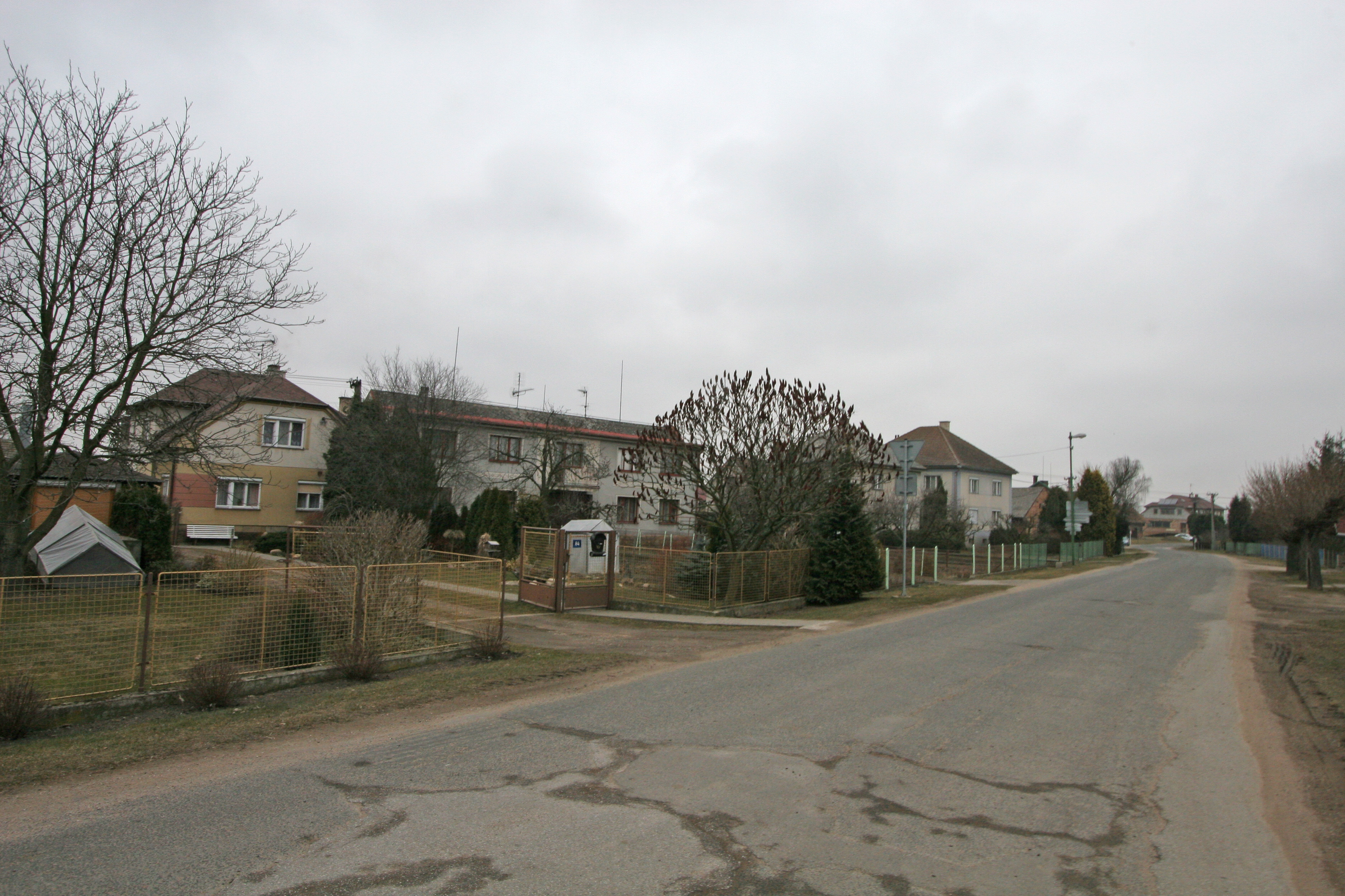 Bříšťany čp. 70 a 60